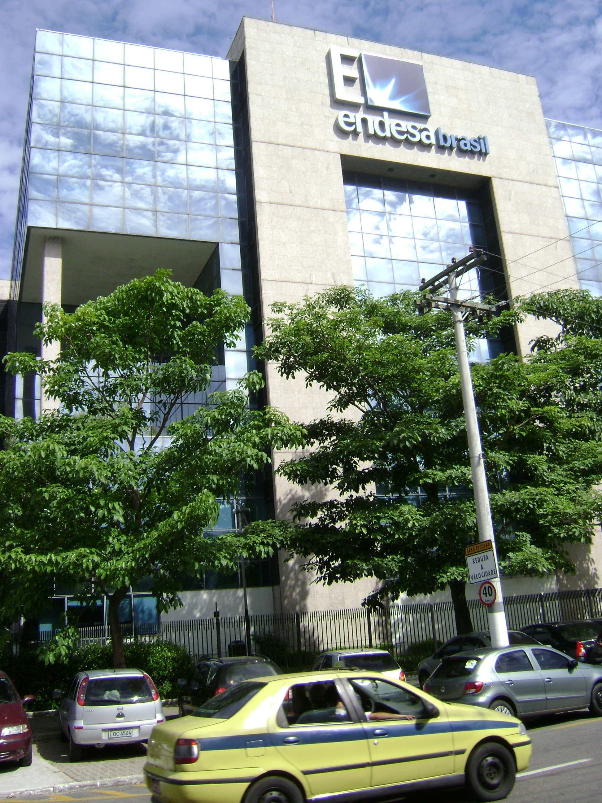 Prédio da Endesa em Niterói.